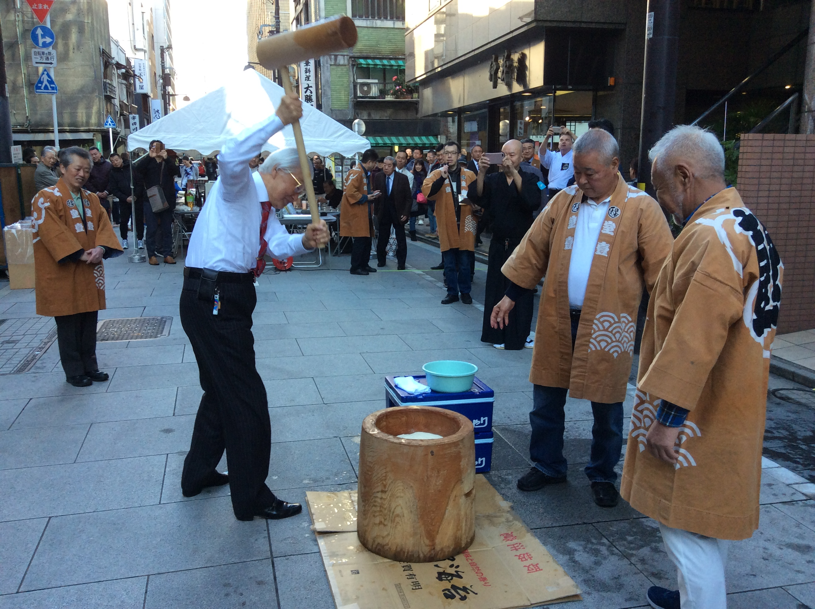 日本橋室町一丁目餅つき大会